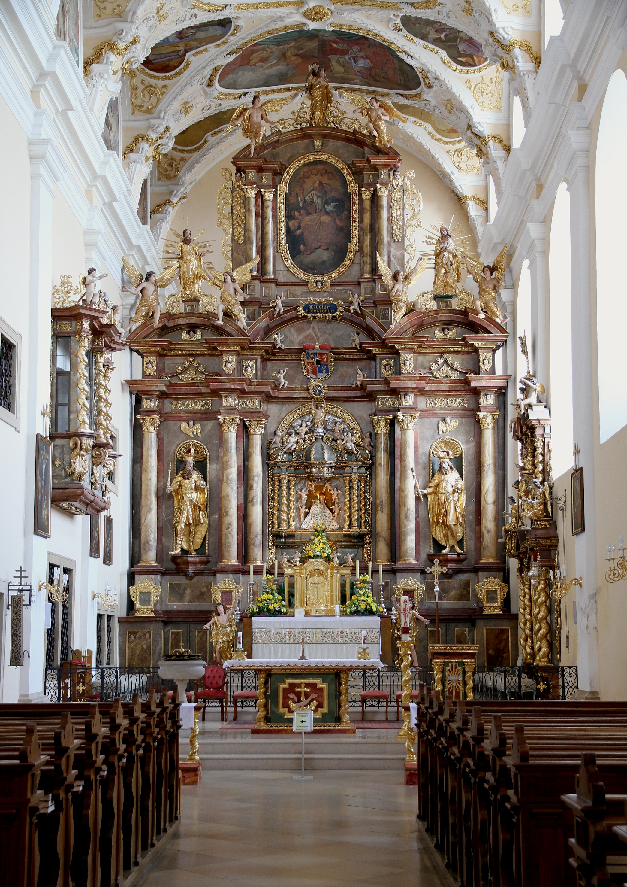 Hochaltar der Basilika Mariä Geburt in der burgenländischen Stadt Frauenkirchen.